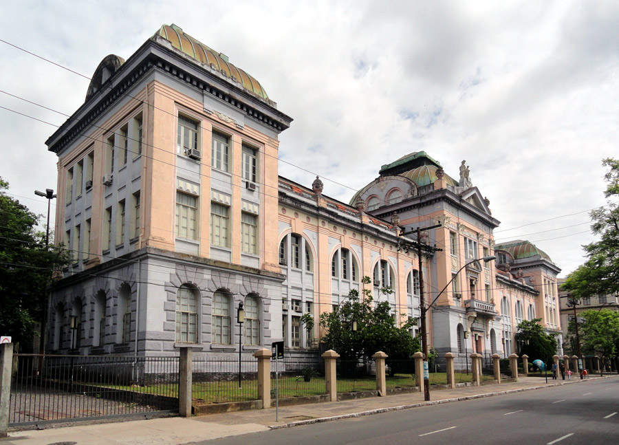 Instituto Parobé, um prédio histórico da Universidade Federal do Rio Grande do Sul, Porto Alegre, Brasil.